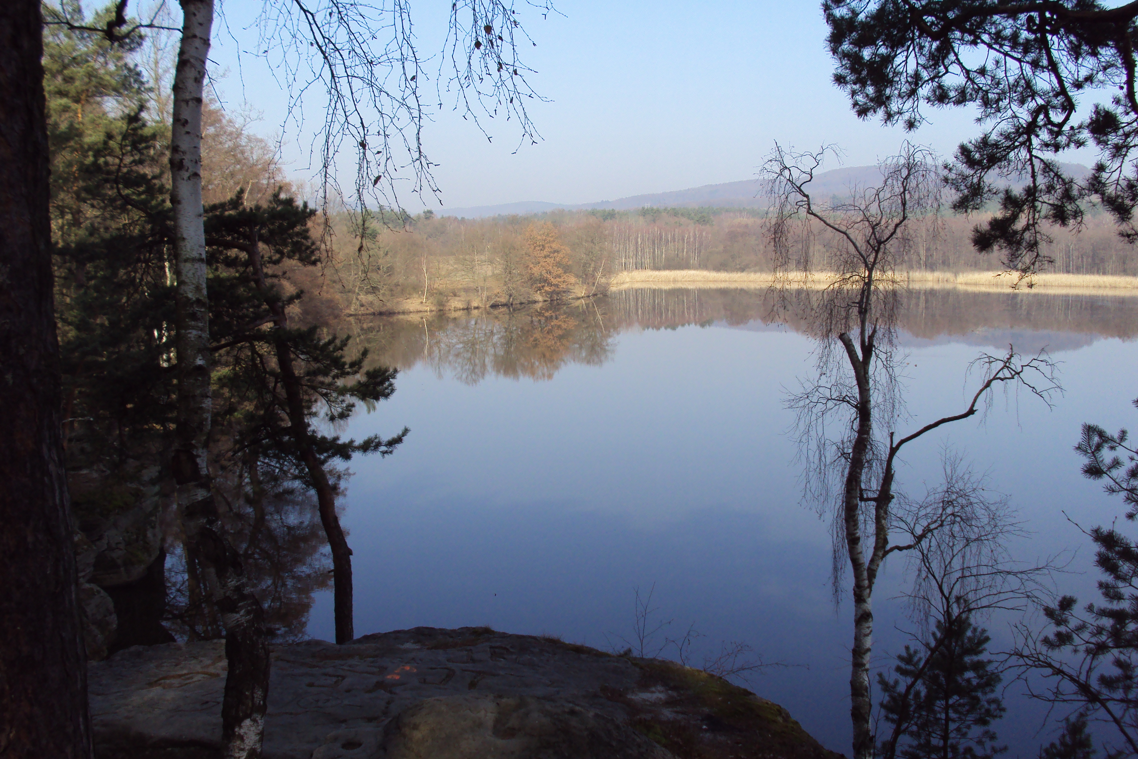 Koňský rybník je na katastru obce Stvolínky na Českolipsku, součást Holanských rybníků